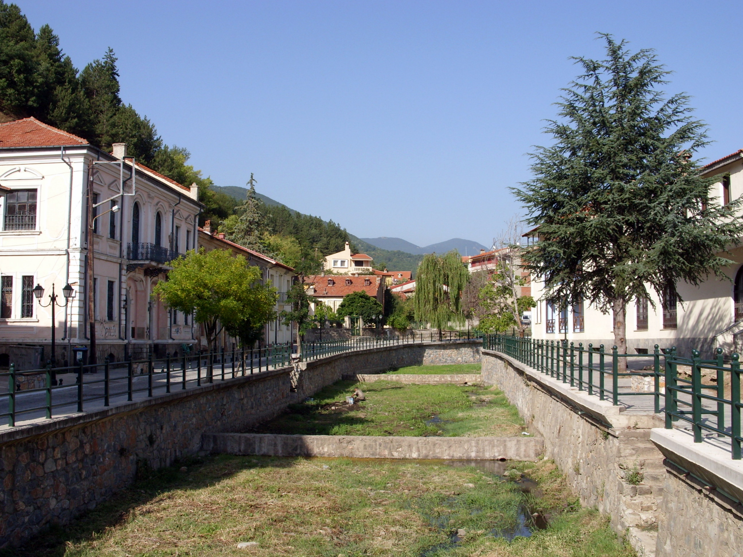 Der fast ausgetrocknete Fluss Sakoulevas im Stadtzentrum von Florina, Griechenland.